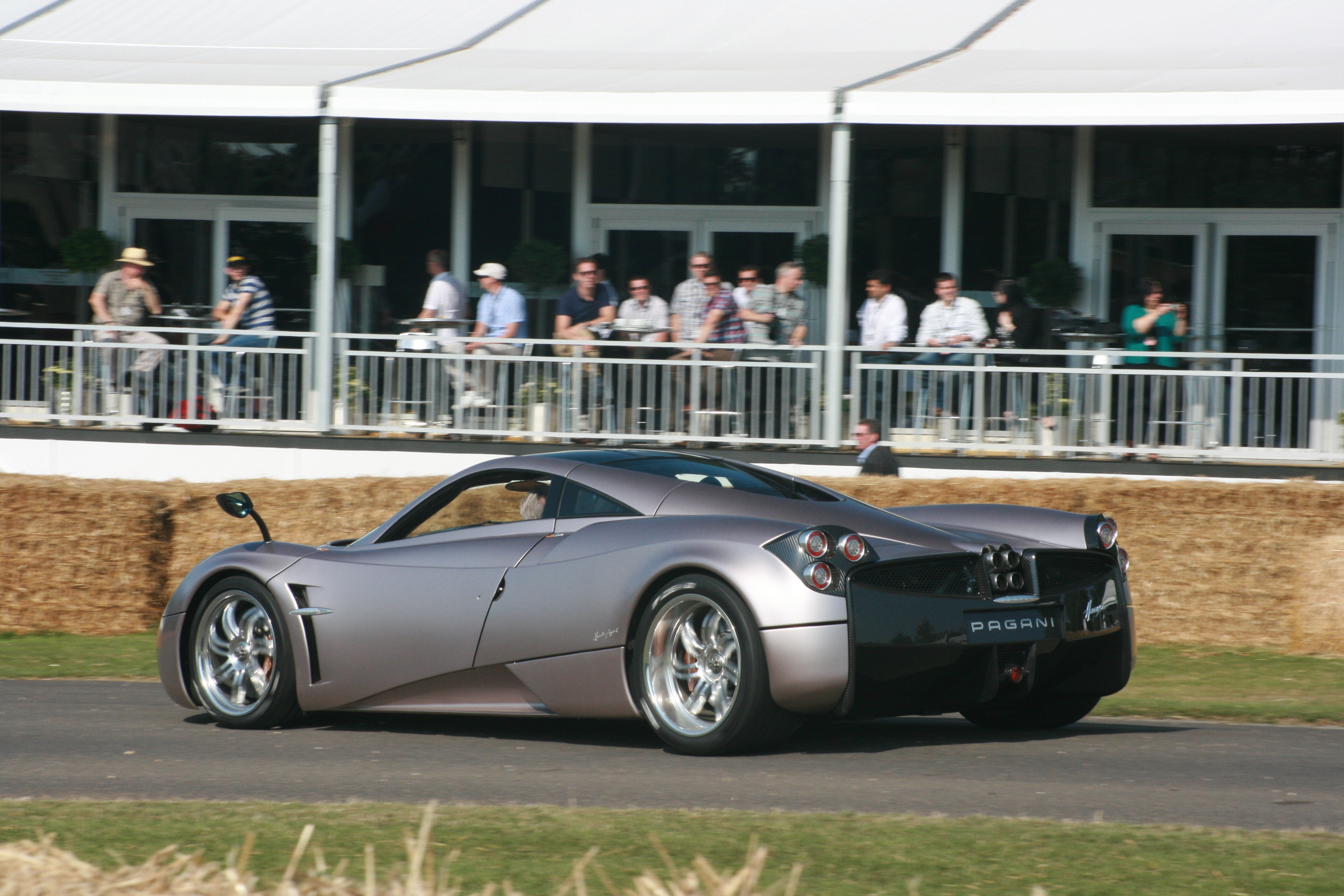 Pagani Huayra